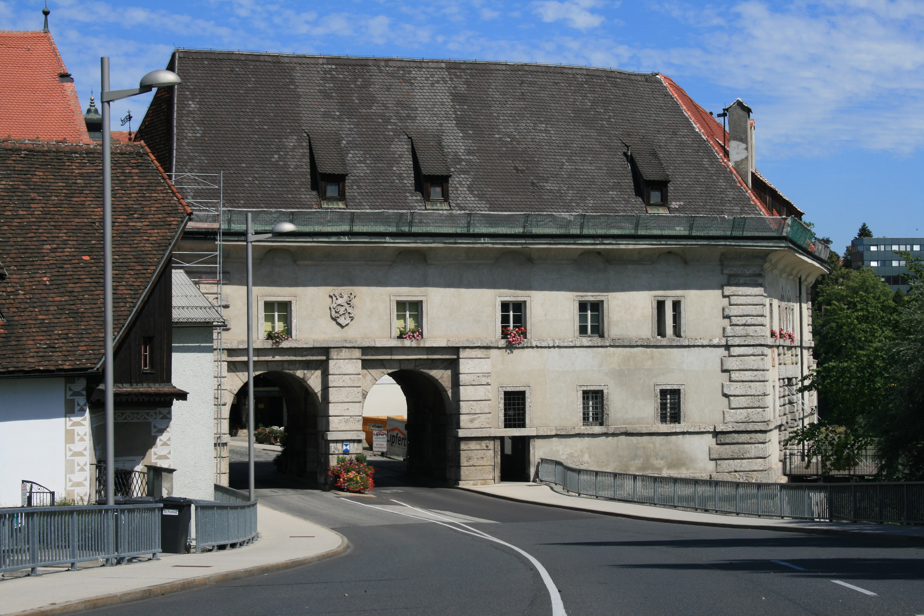 Das Neutor. Ein ehemaliges Steyrer Stadttor im Renaissancestil am Eingang zum Grünmarkt, Richtung Hauptplatz